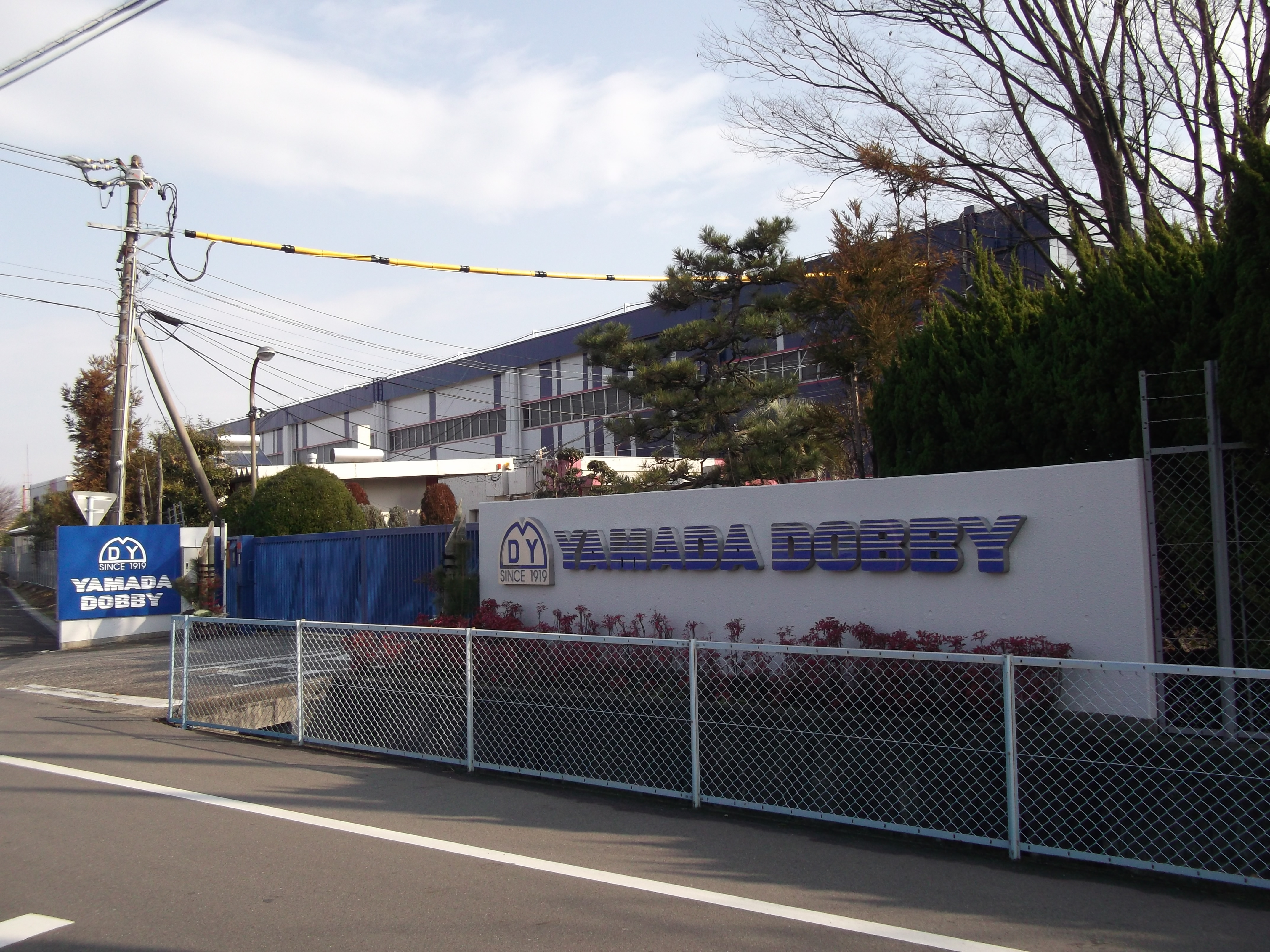 愛知県一宮市の山田ドビー本社入口を撮影